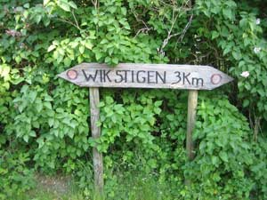 wikparken